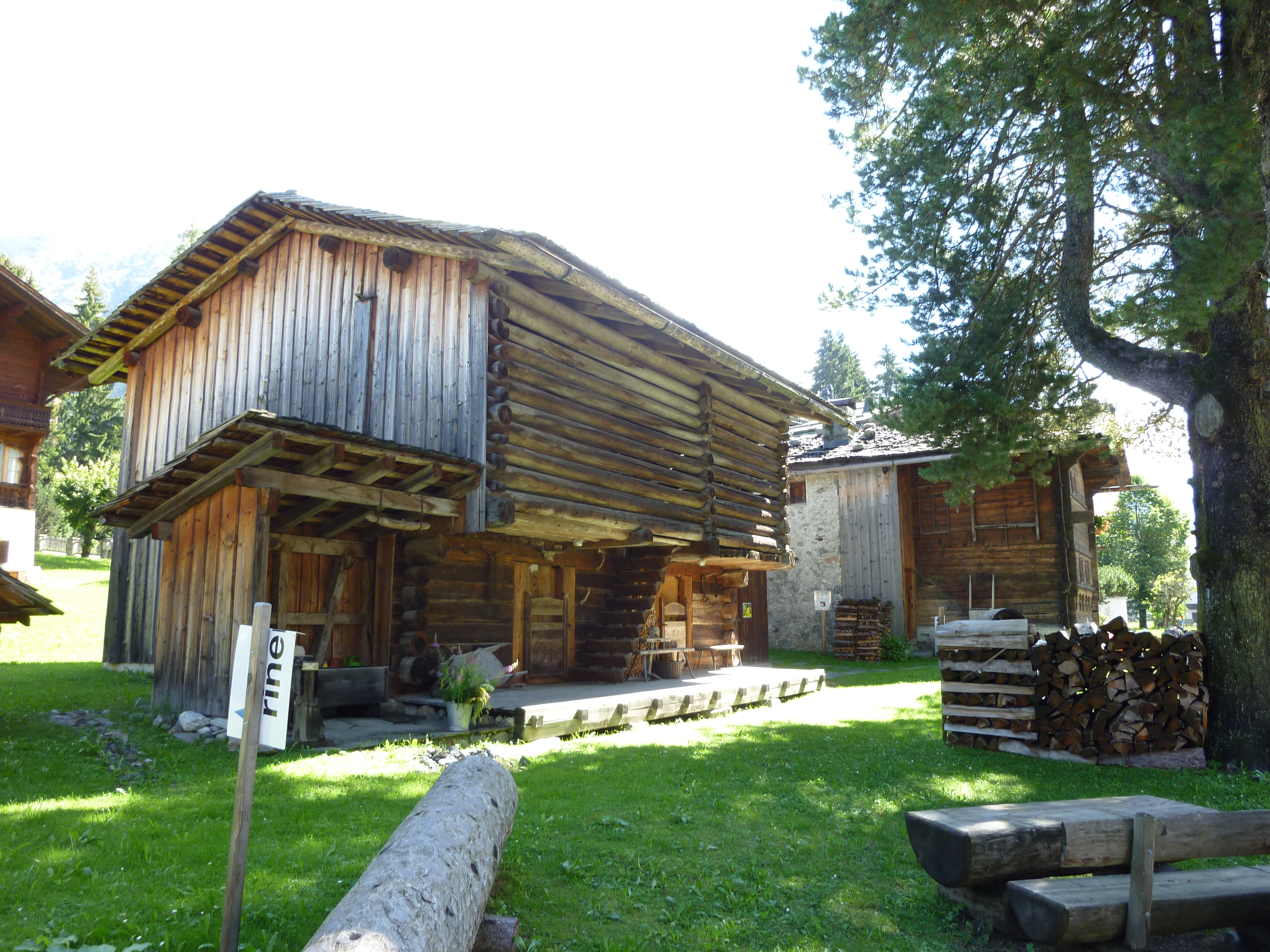 Nutli Hüschi Scheune